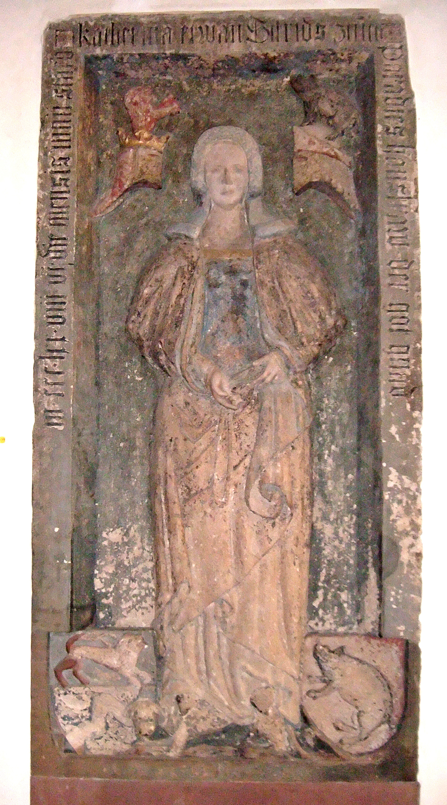 Frankfurt, Alte St. Nikolaikirche, Epitaph für Katharina zum Wedel (+ 1378), 2. Frau von Siegfried zum Paradies (+ 1386), Bürgermeister von Frankfurt